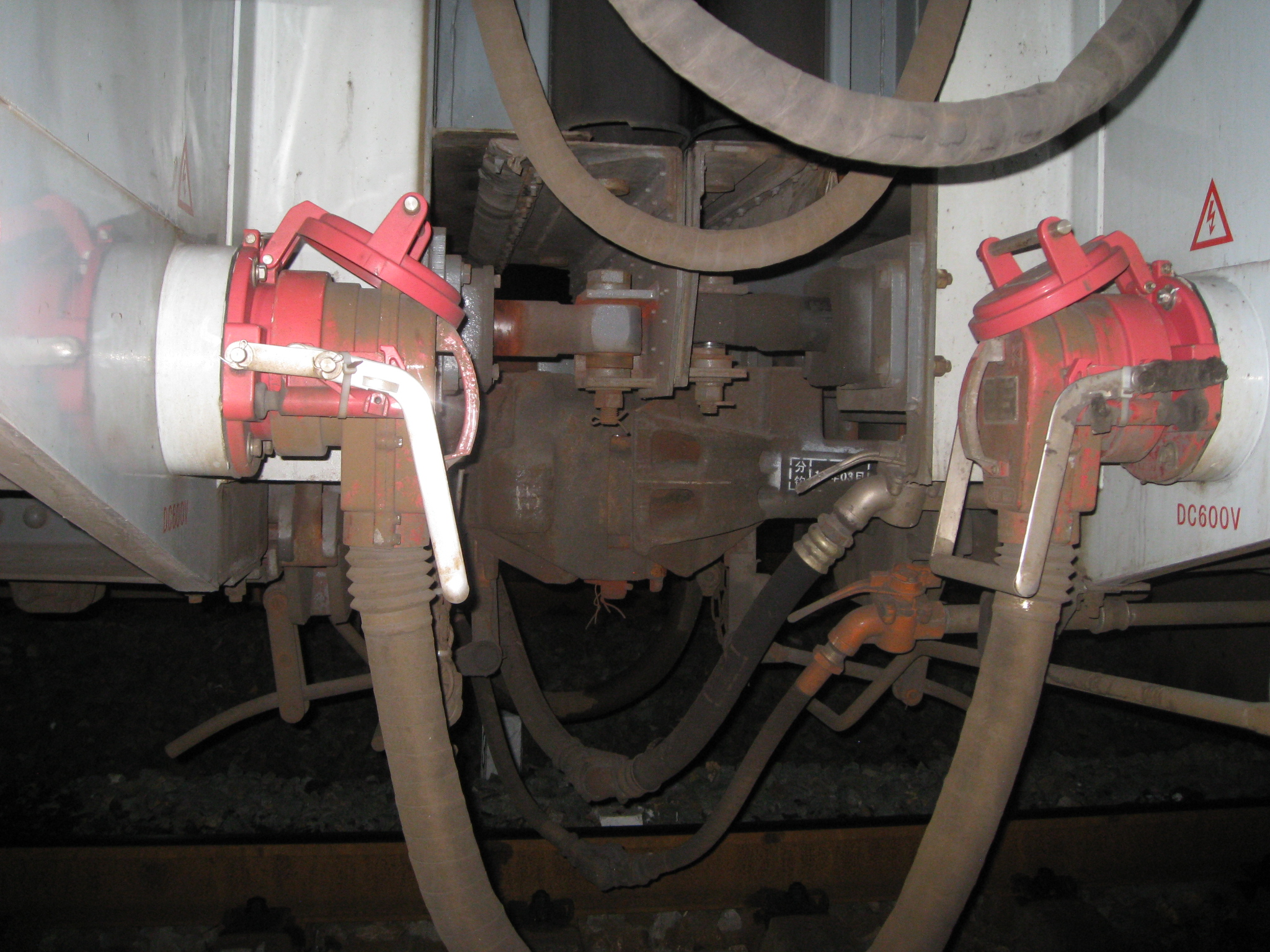 中文（中国大陆）: DC600V制式的25G车厢连接处